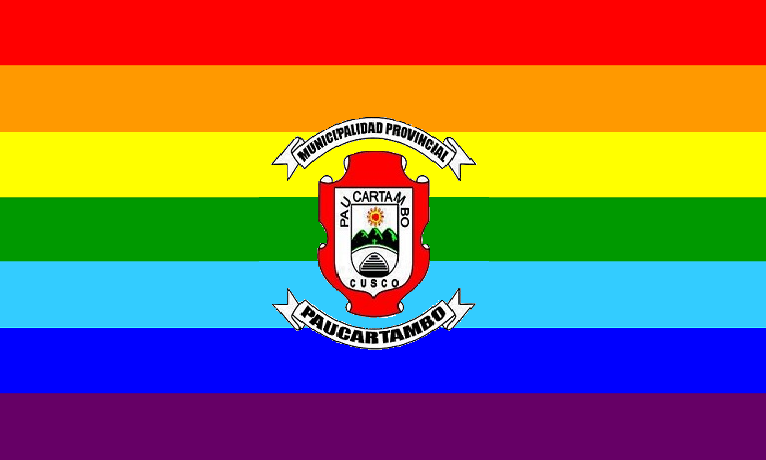 Bandera de la provincia de Paucartambo, departamento de Cusco, Perú